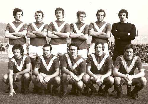 Una formazione del Brescia nella stagione 1971-72. In piedi, da sinistra: Busi, De Paoli, Cencetti, Gasparini, Mazzanti, Galli; accosciati: Salvi, Nardoni, Turra, Fanti, Cagni.